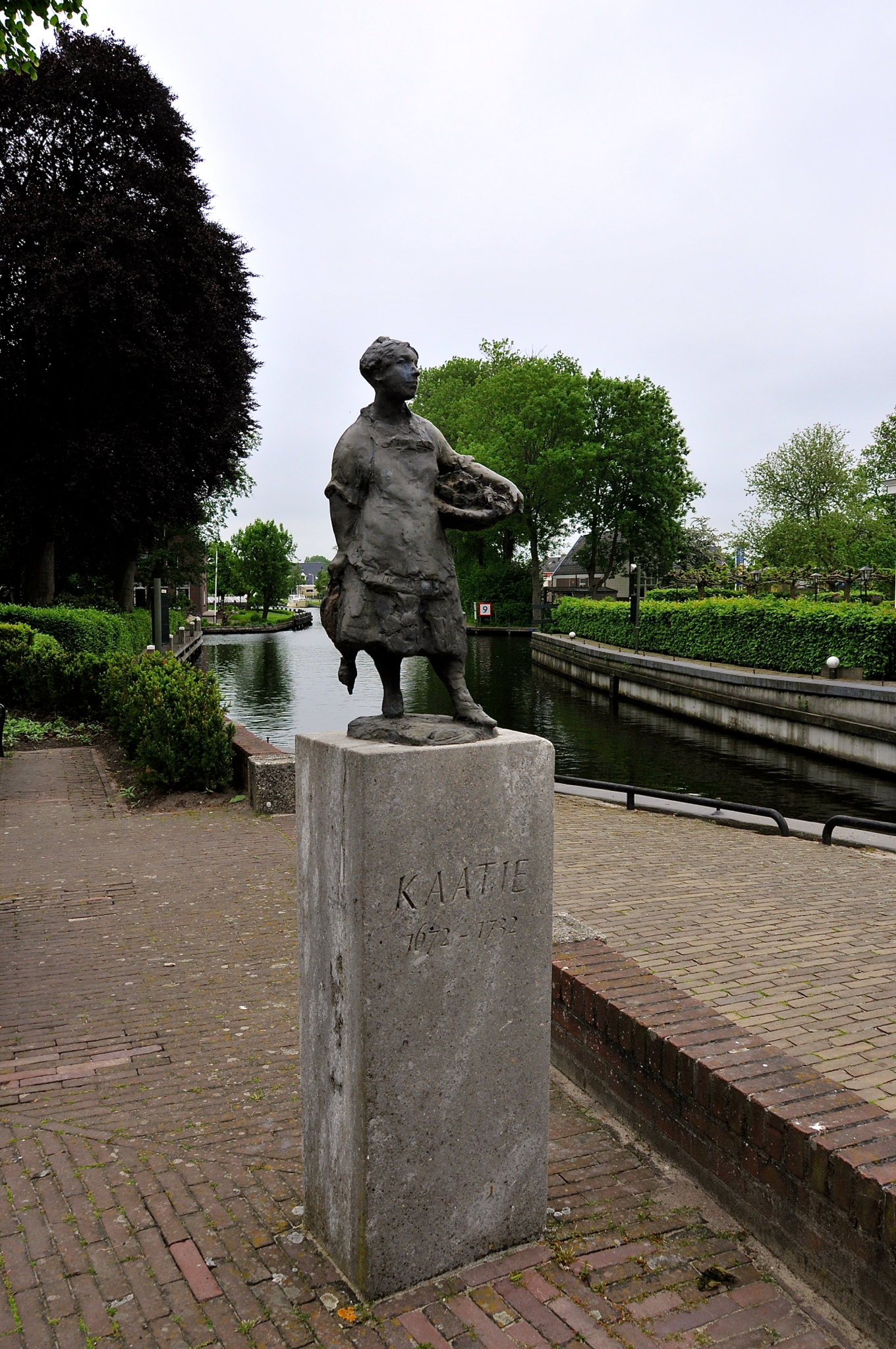 "'Kaatje' Blokzijl Beeld gemaakt door de Nederlandse kunstenaar Guus Hellegers (Teteringen 1937). Het beeld staat bij de sluis, tegenover het restaurant "Kaatje bij de sluis'. Aan het beeld is een legende verbonden, zie